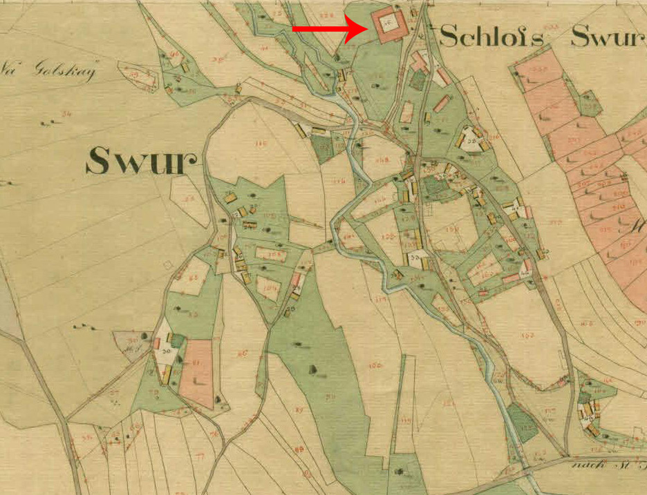 Franciscejski kataster za Kranjsko, 1823-1869